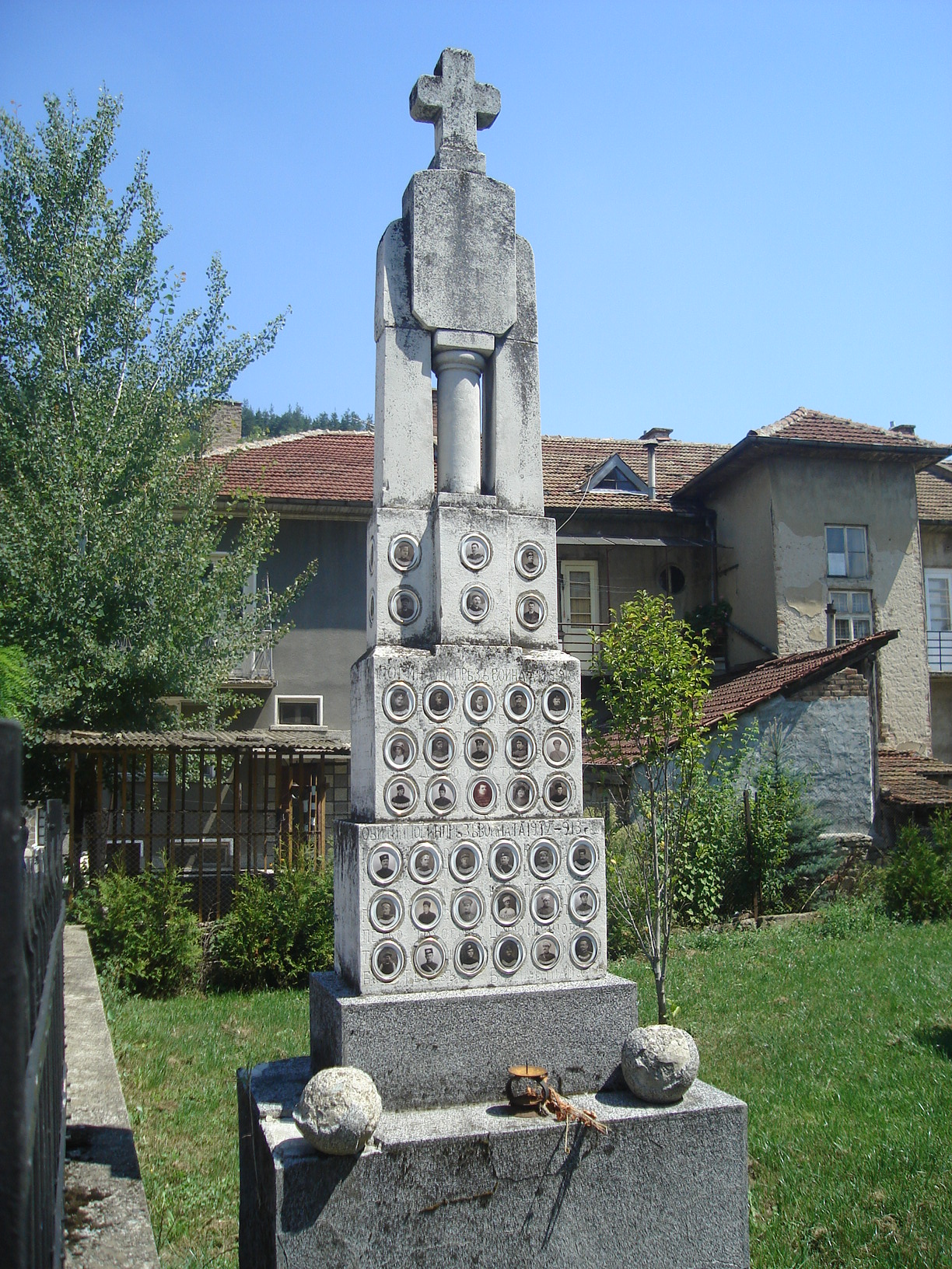 Паметник на загиналите за Отечеството в Плачковци, построен от Дончо Кънев - Чалъма, открит на 01.01.1921